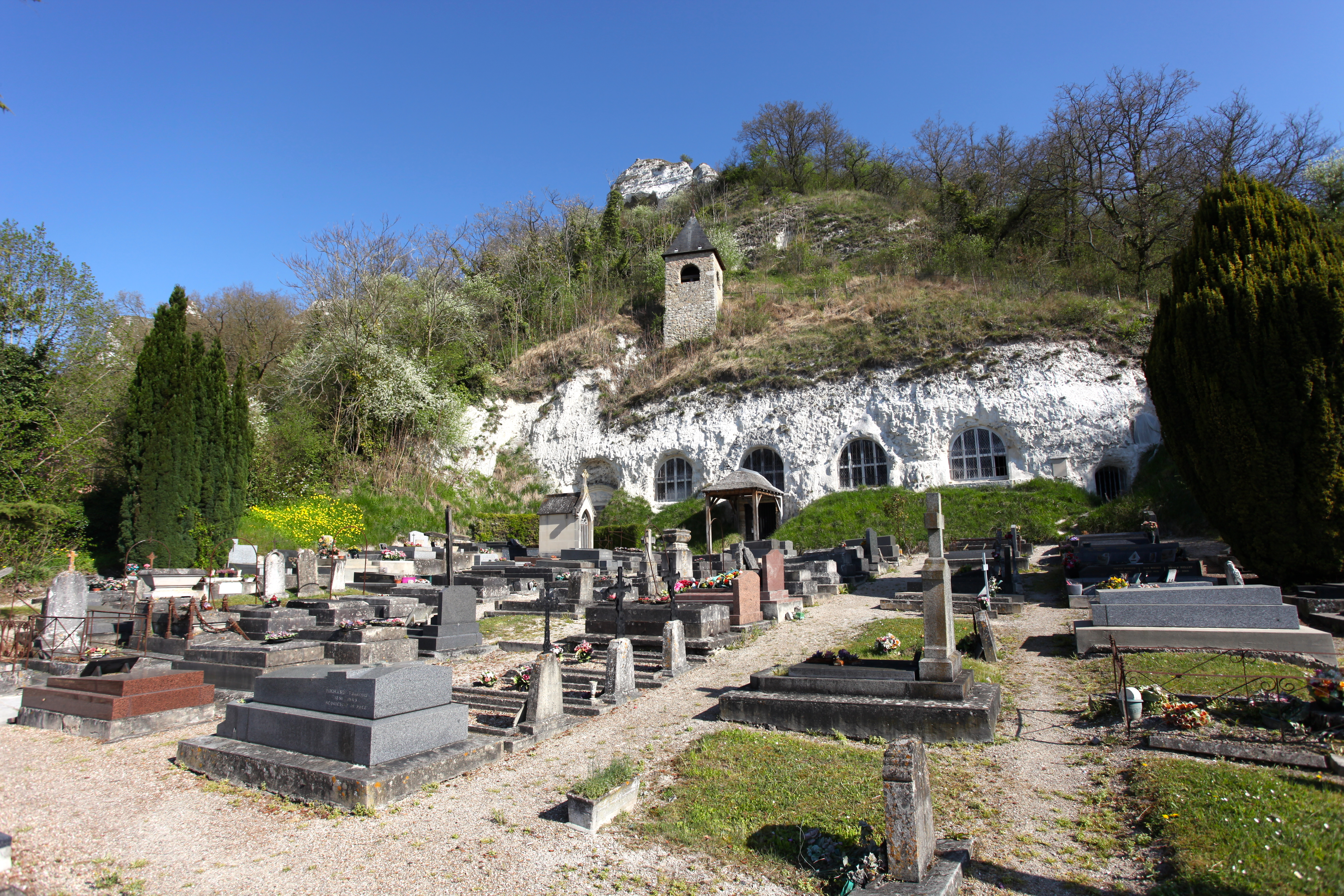 Eglise troglodyte Notre Dame de l'Annonciation et cimetière de Haute-Isle, France